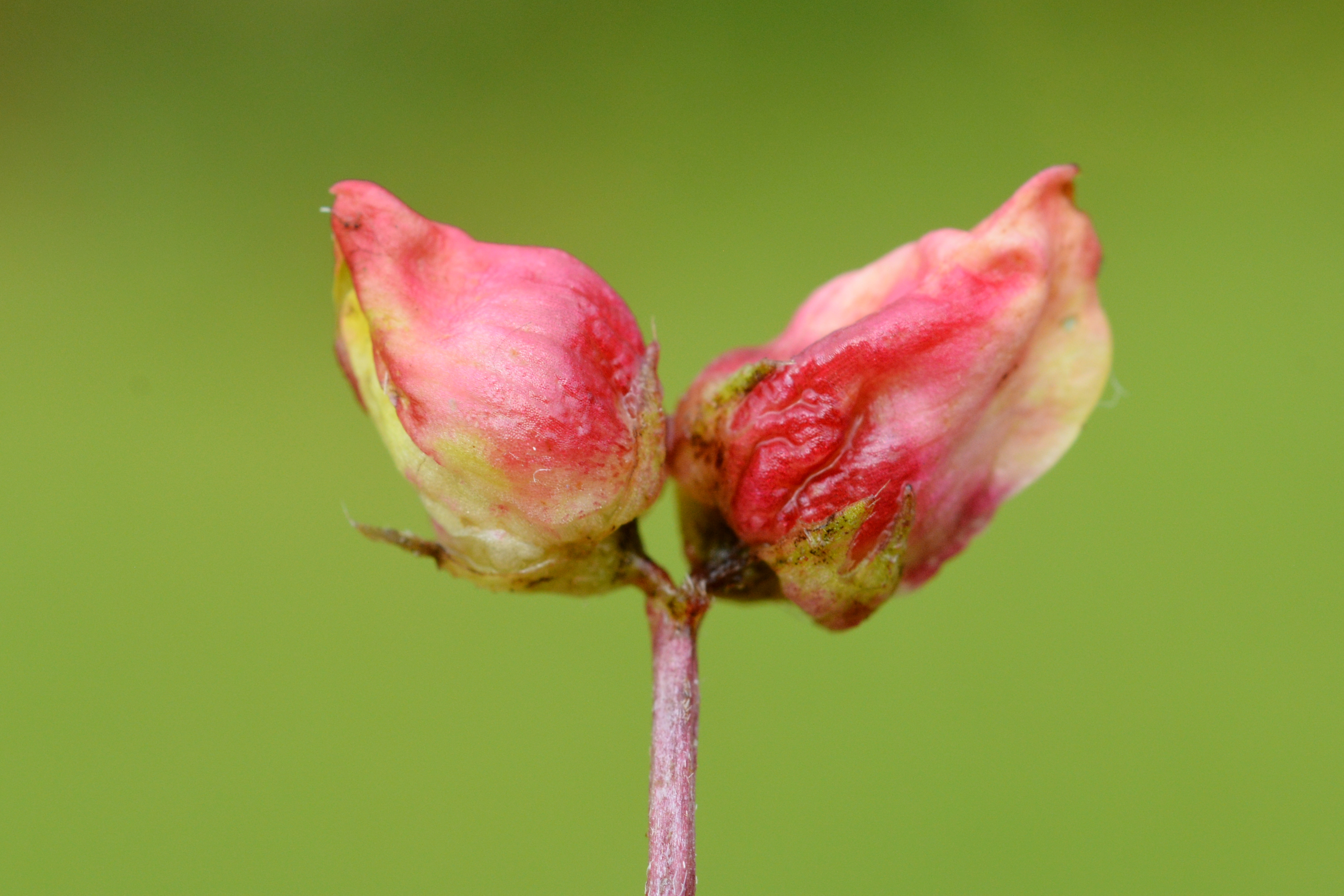 Contarinia loti on Lotus corniculatus